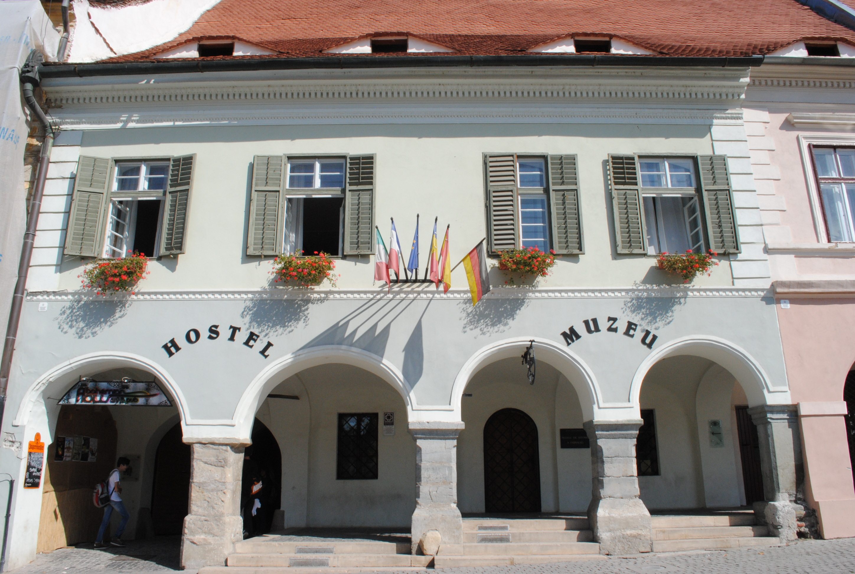 Casă și farmacia " La Ursul Negru", azi locuințe și Muzeul de Istoria Farmaciei, sec. XV - XVI, sec. XVIII